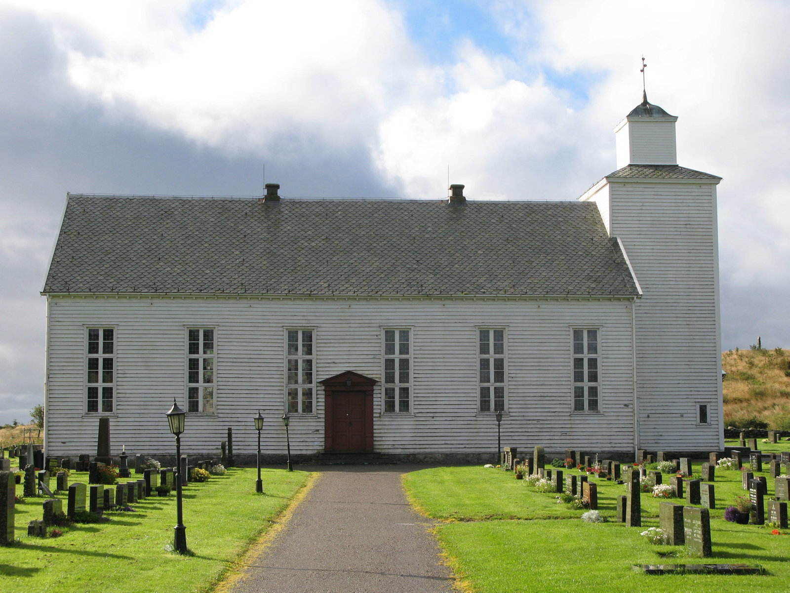 Falnes kirke. Foto: Bård Langvandslien. Fra Riksantikvarens Kulturminnesøk.